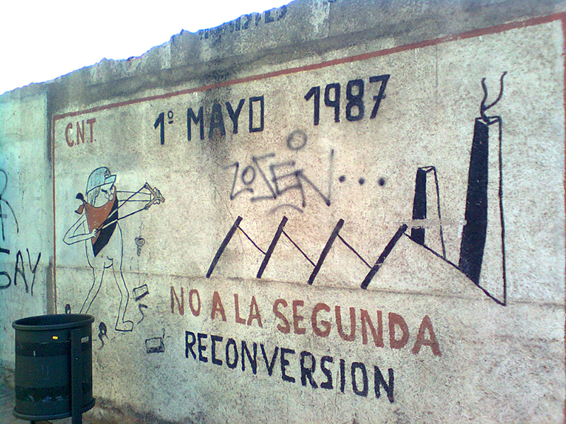 Mural de la CNT al carrer Pomar de Baix cantonada amb Riera Canyadó.